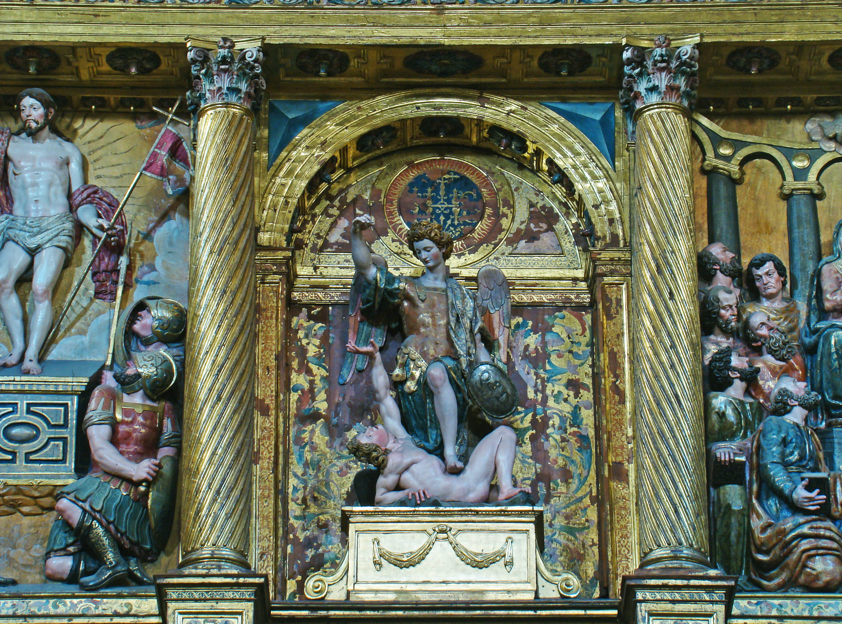 Escultura de San Miguel del escultor Gregorio Fernández, procedente de la desaparecida iglesia del mismo nombre, en Valladolid. En aquella iglesia se encontraba en lugar preferente del altar mayor, lo mismo que en la parroquia de San Miguel y San Julián en Valladolid.